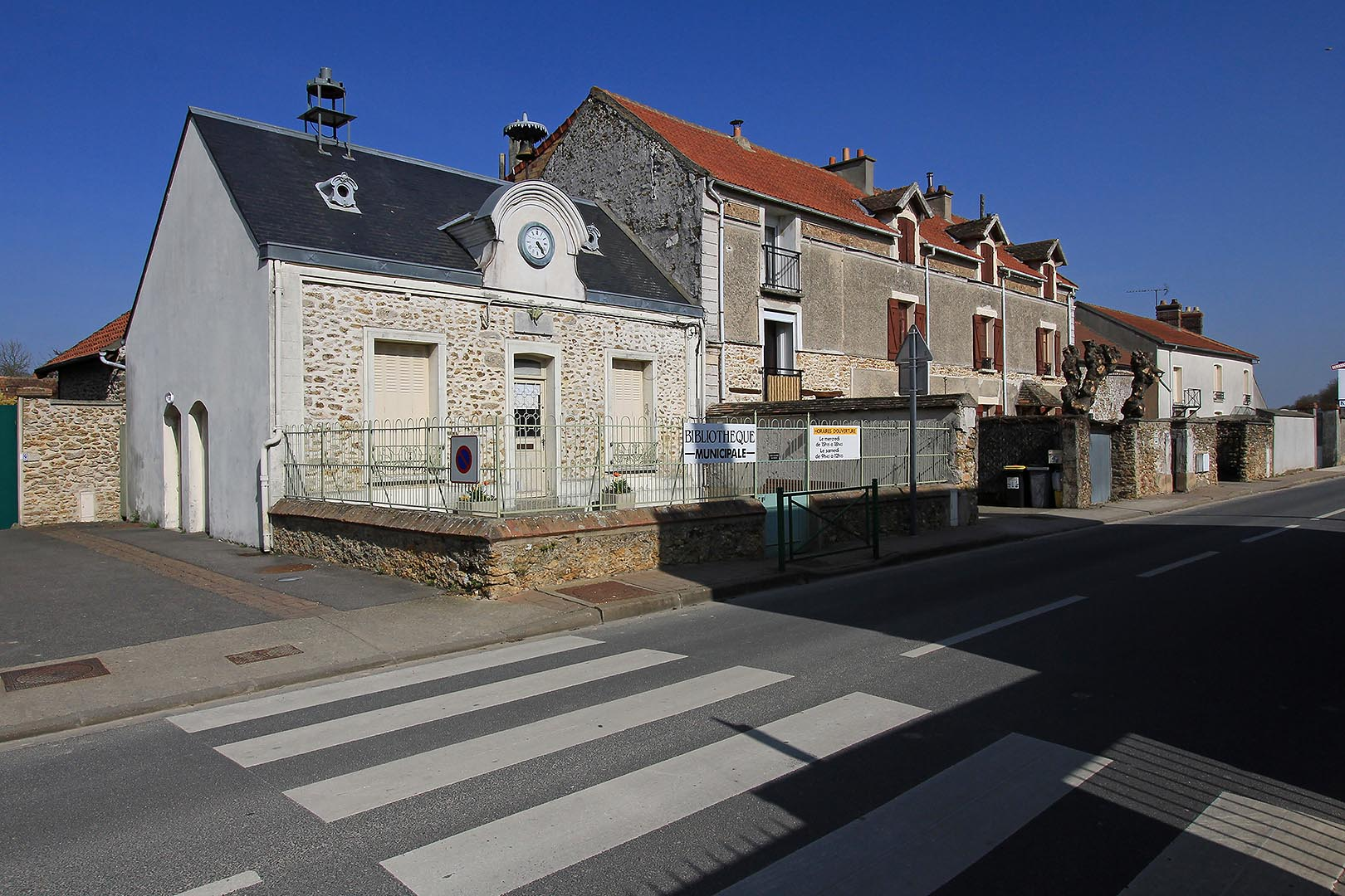 Bliblothèque municipale de Guibeville